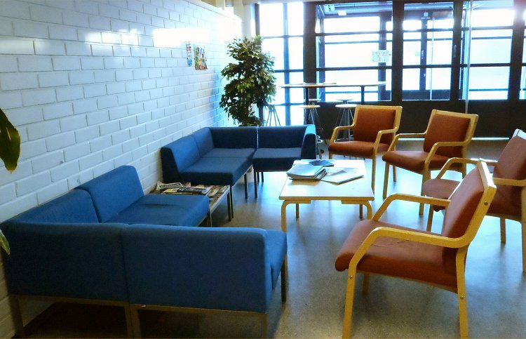 Kokemäen lukion aula